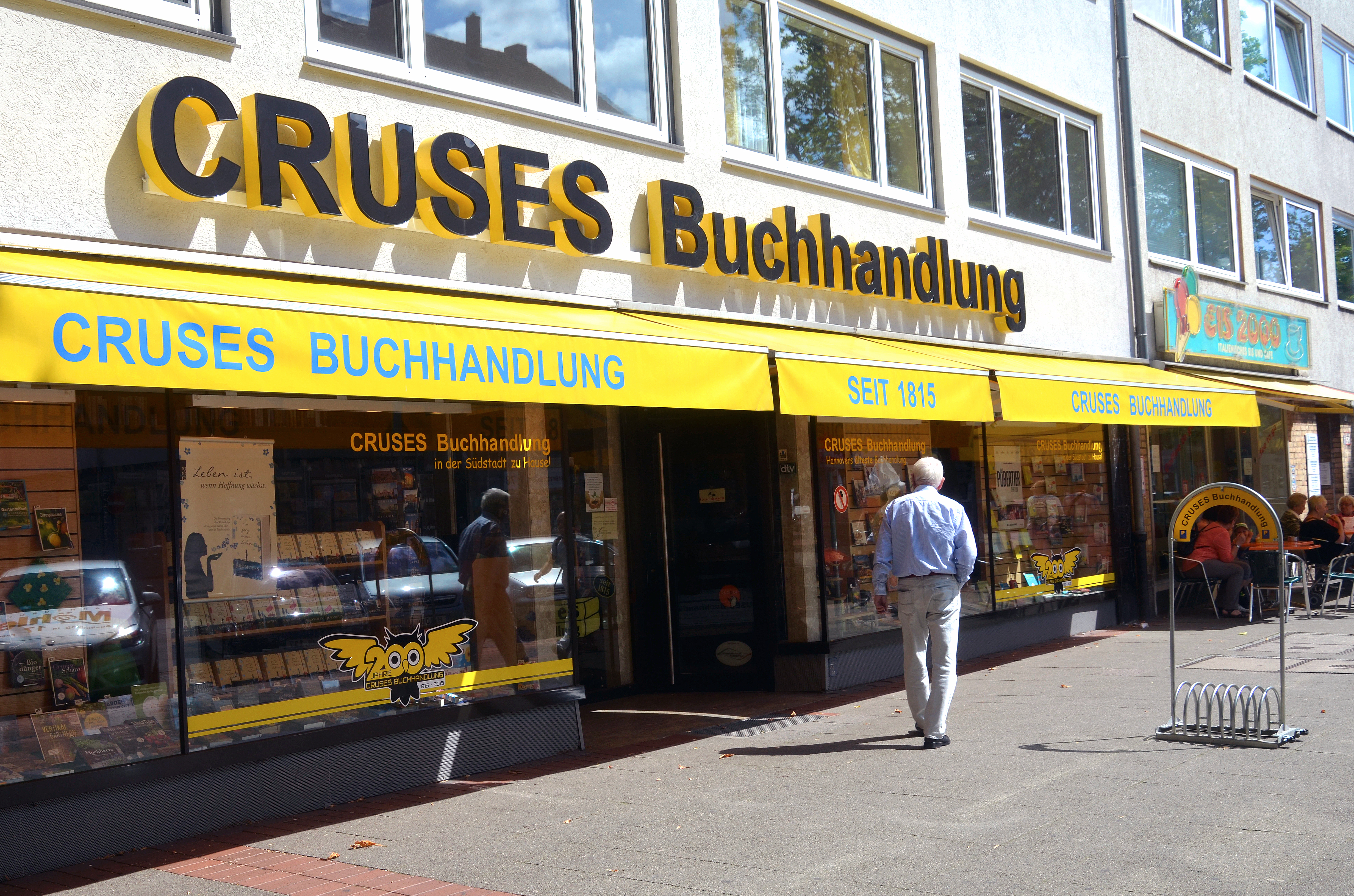 Seit 1815 in Hannover: Das Hauptgeschäft von Cruses Buchhandlung in der Hildesheimer Straße 75 in der Südstadt von Hannover ...